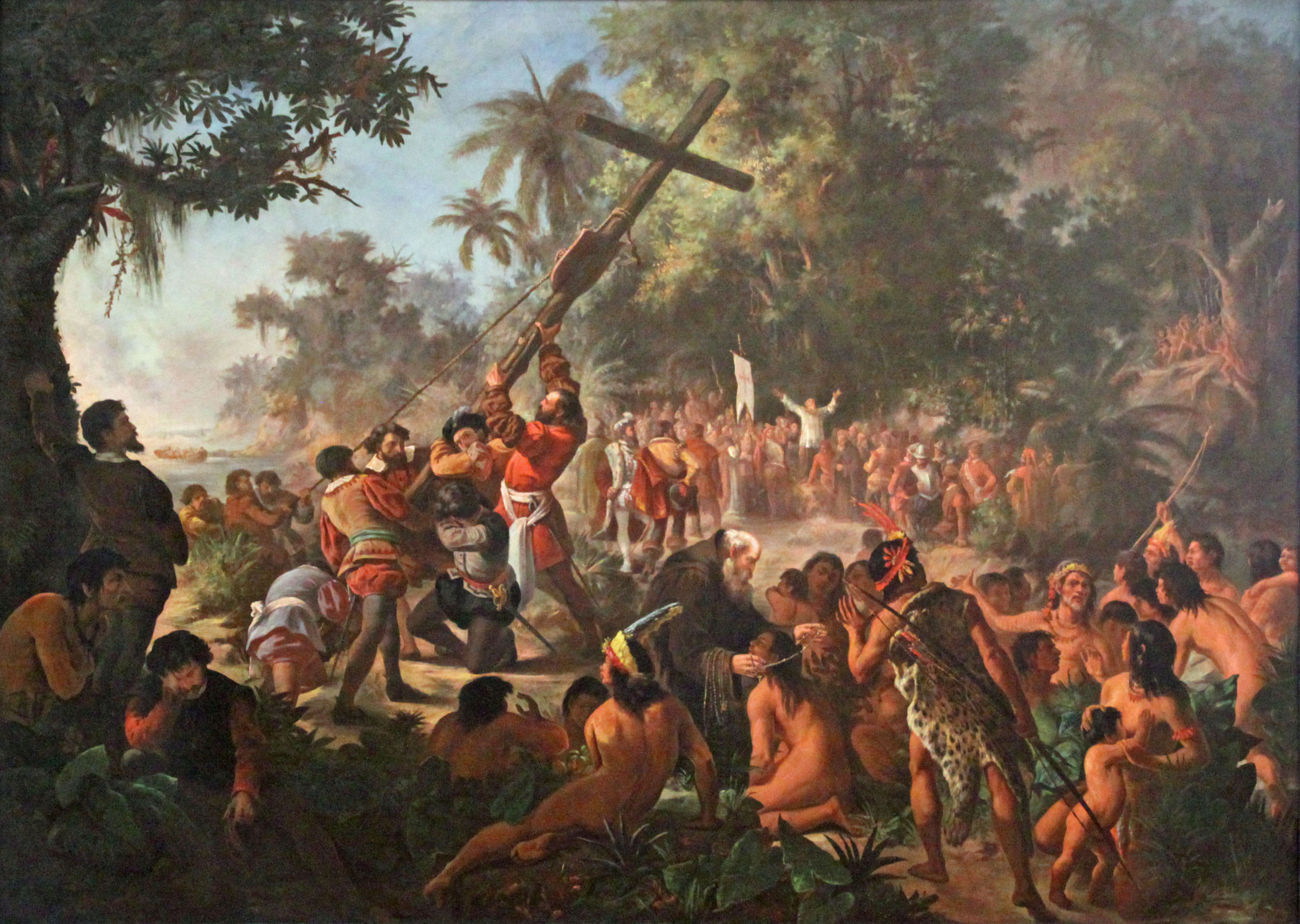 Museu Nacional de Belas Artes - Rio de Janeiro - Pedro Peres - Elevação da Cruz em Porto Seguro, BA, 1879 - óleo sobre tela - 200,5 x 276 cm - assinada P.Peres, 1879 - compra, 1879.